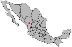 Location Durango, Durango.